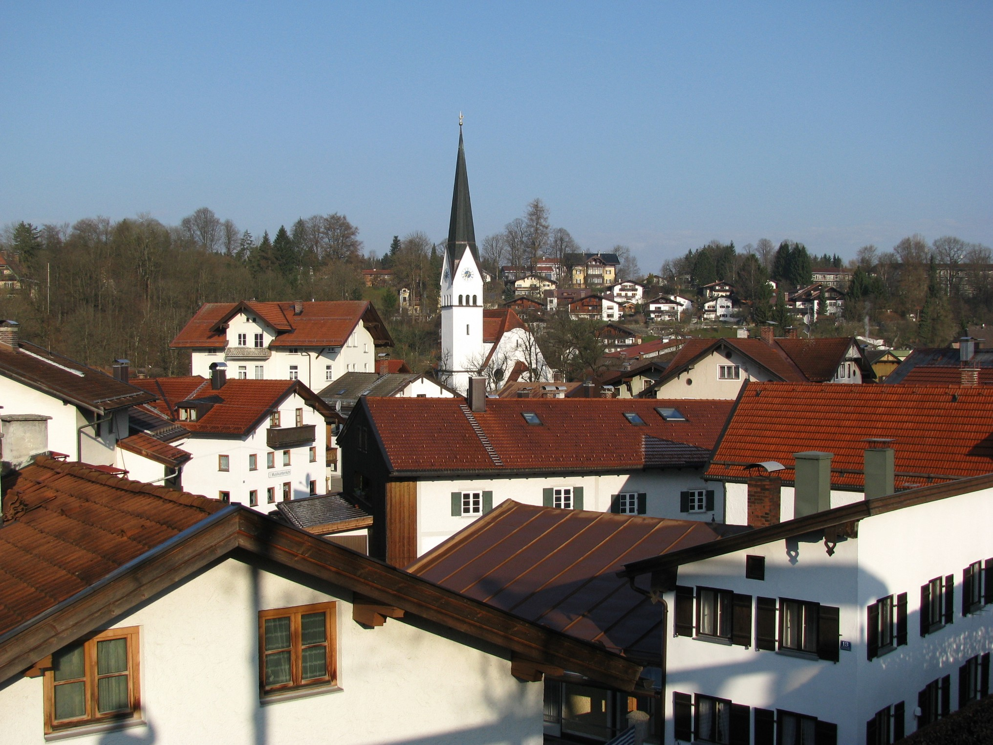 Miesbach in Oberbayern; Gegend um den Marktplatz und die evangelische Kirche